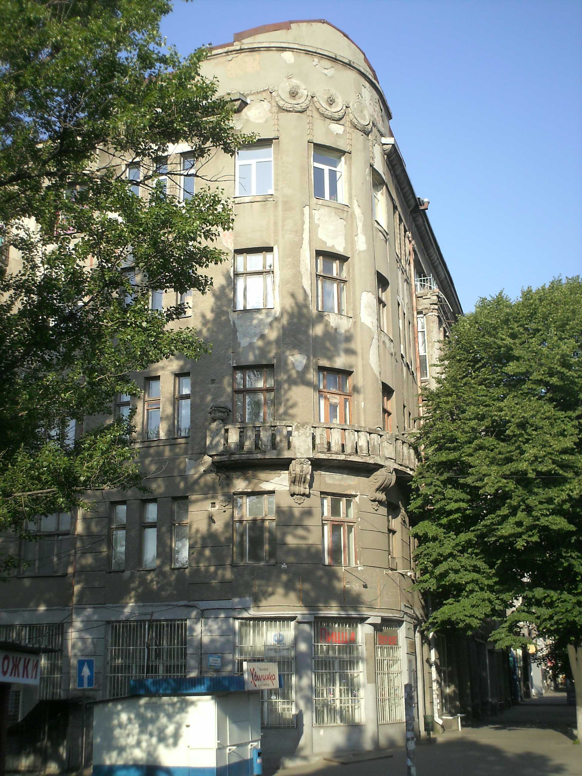 описание